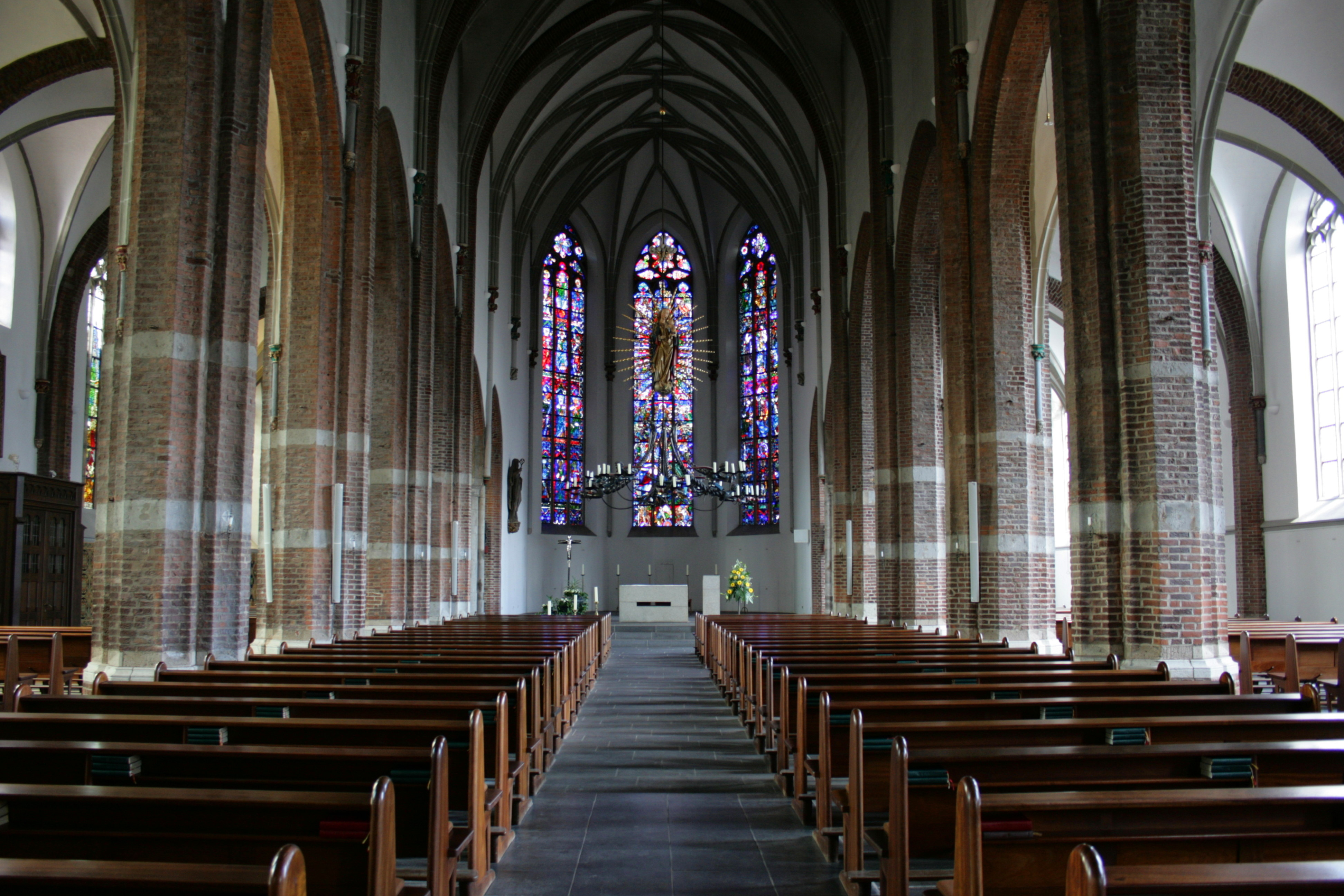 Sankt Aldegundis in Emmerich am Rhein